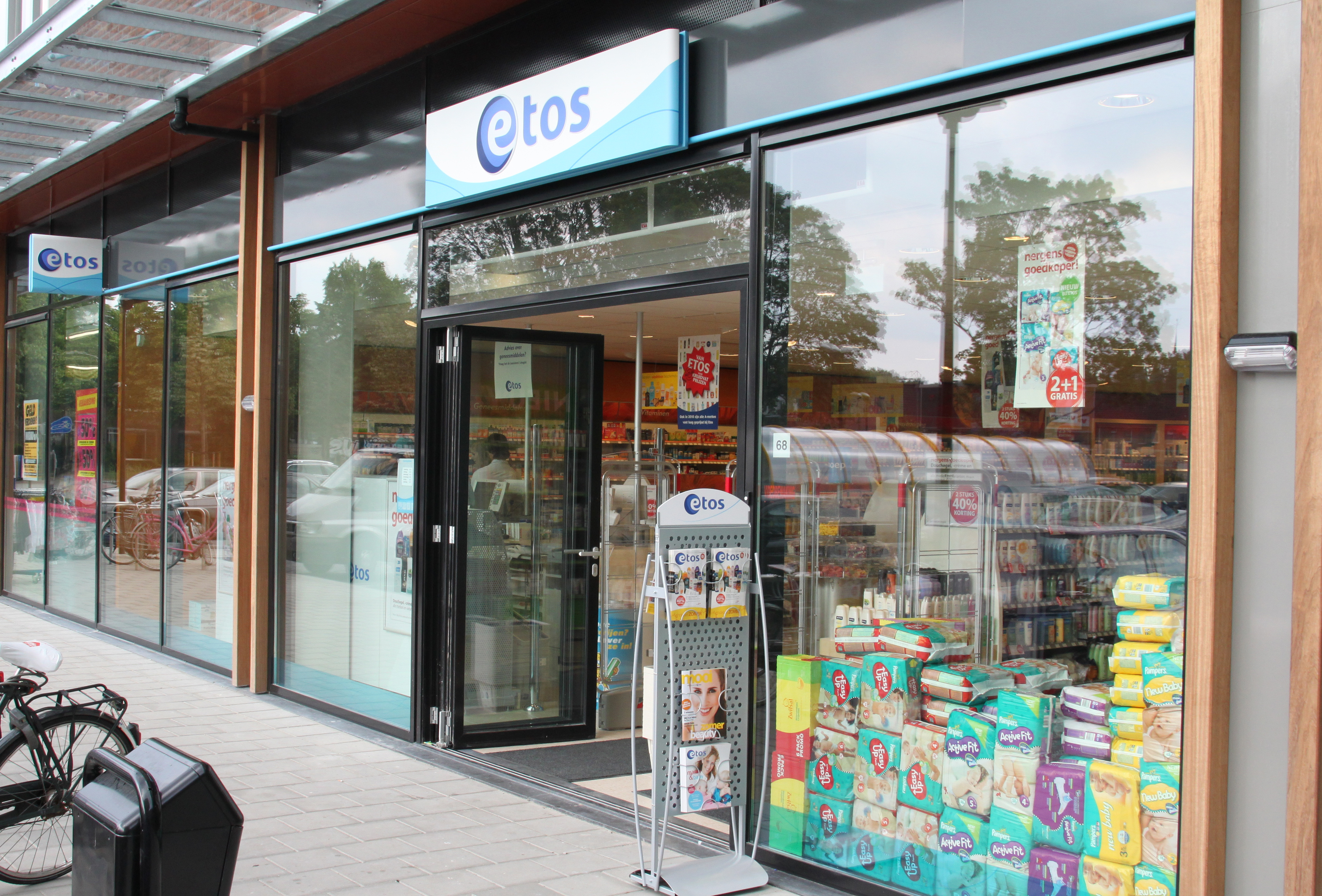 ETOS winkel in Utrecht, Ina Boudier-Bakkerhof.